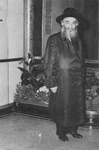 הרב בסוף ימיו